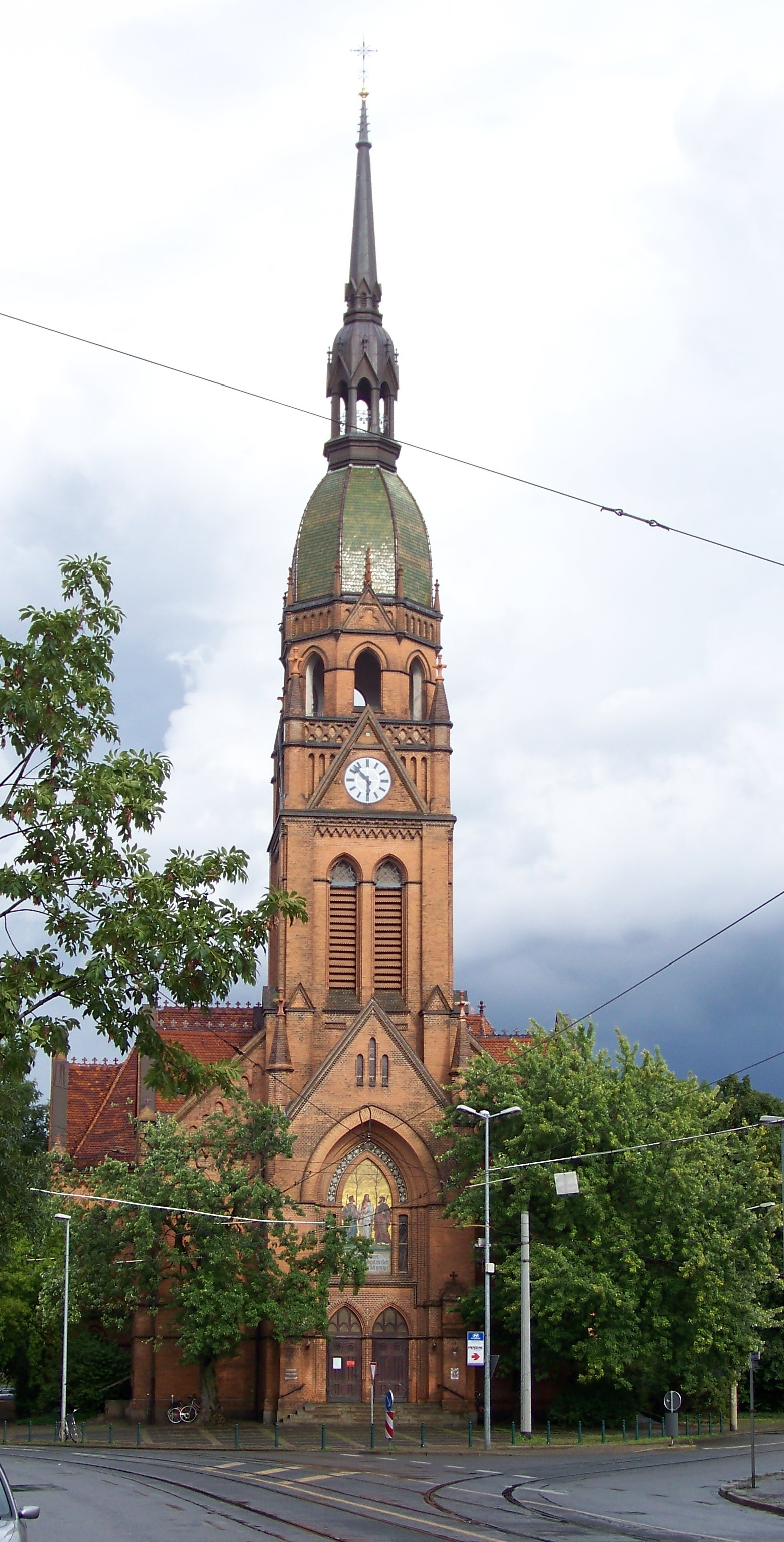 Emmaus-Kirche in Leipzig-Sellerhausen